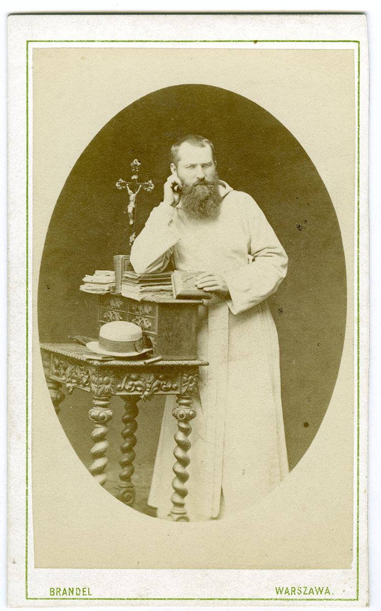 Ks. Nowalski, kameduła. Fotografię wykonał Konrad Brandel ok. 1876 r. Oryginał fotografii znajduje się w zbiorach Muzeum Warszawy, sygn. AF 16874